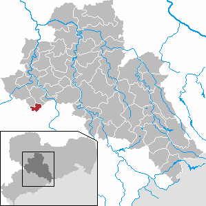 Hartmannsdorf in Saxony - district Mittelsachsen